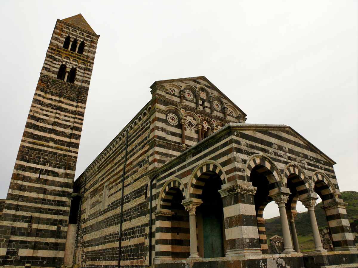 piazza d' italia sassariBasilica della Santissima Trinità di Saccargia.